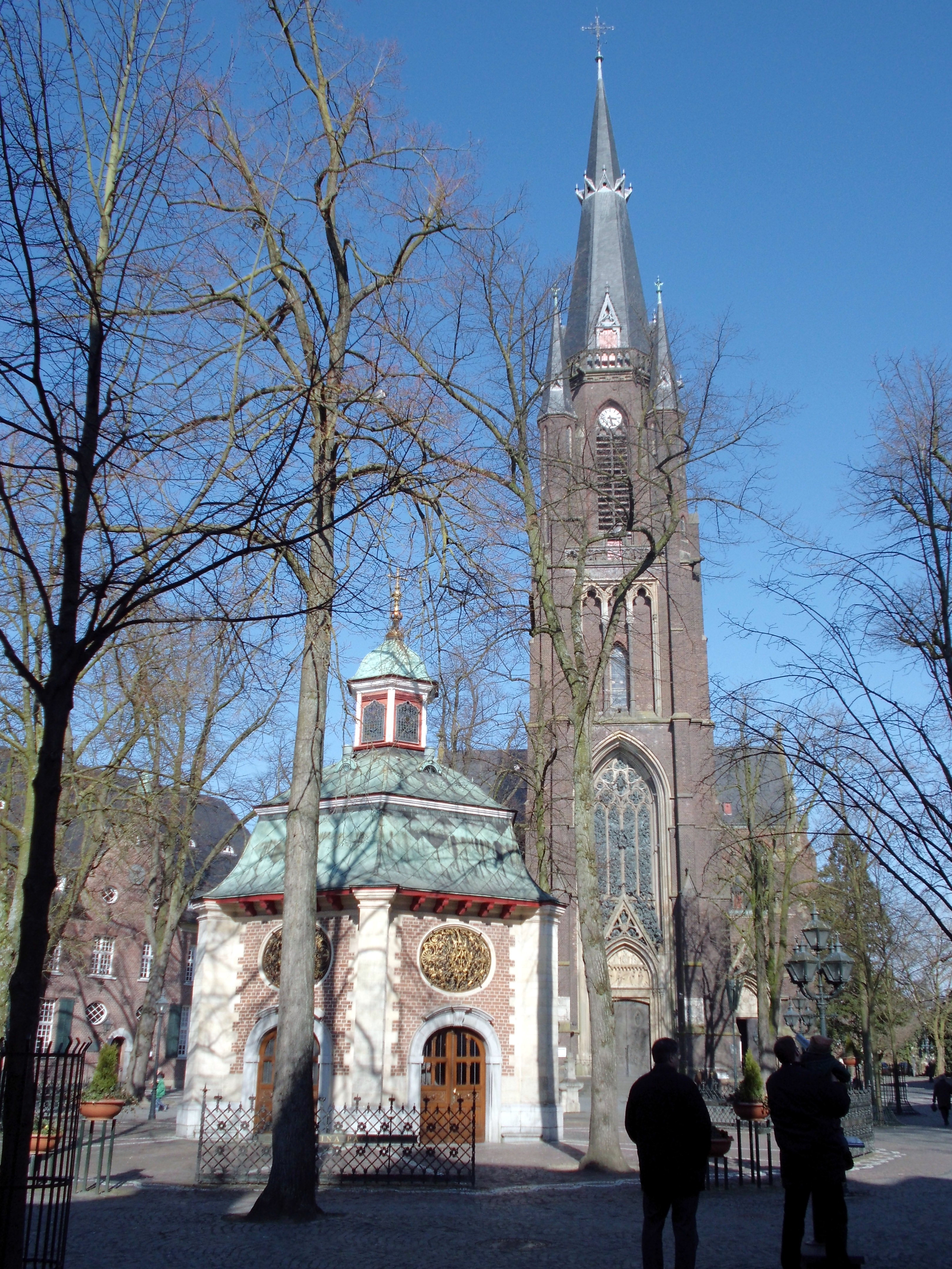 Basilika und Gnadenkapelle in Kevelaer